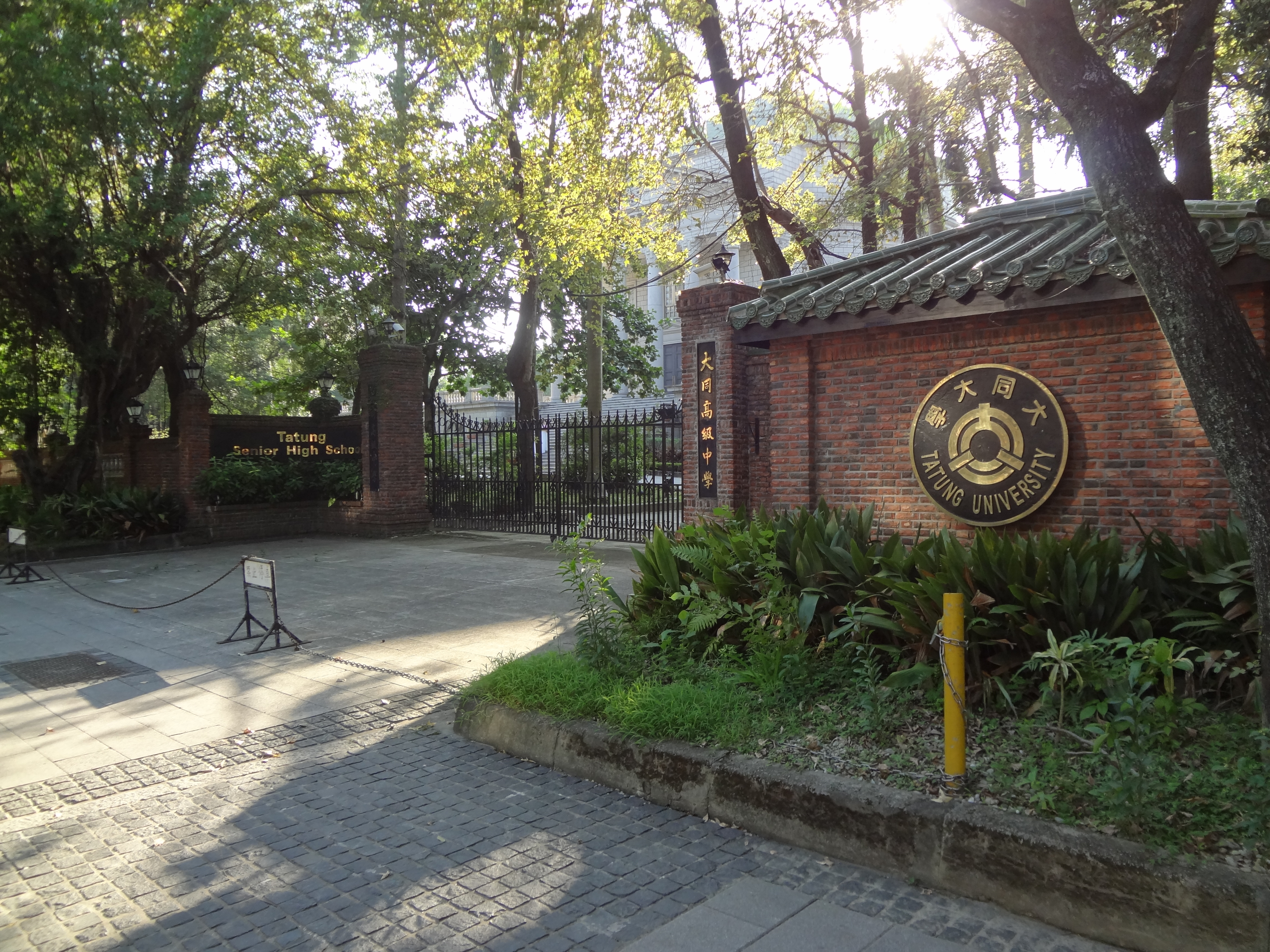 臺北市私立大同高級中學大門，右側圍牆釘掛大同大學校徽鑄字招牌。